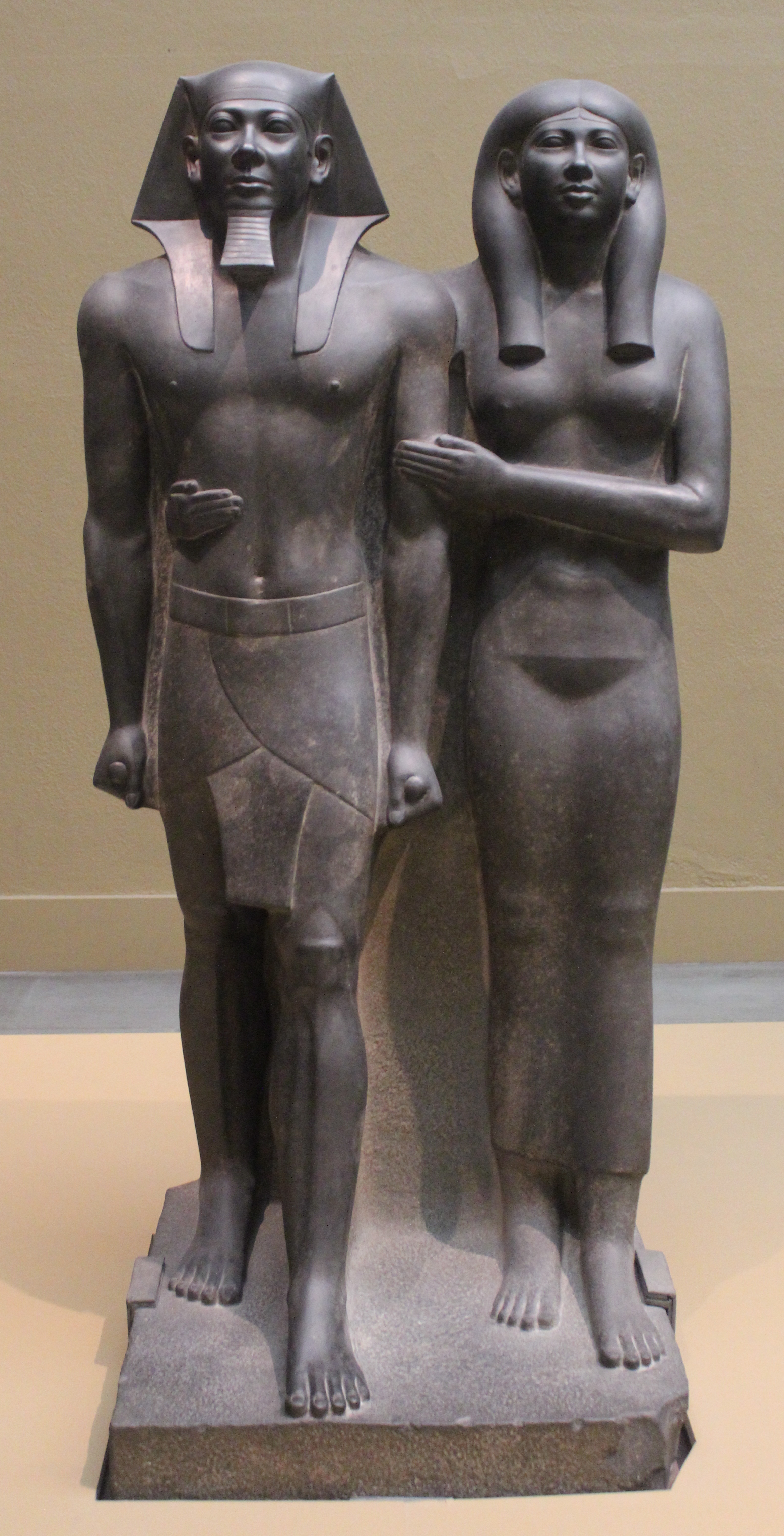 Menkaura y la reina Khamerernebti, Boston, Museum of Fine Arts.